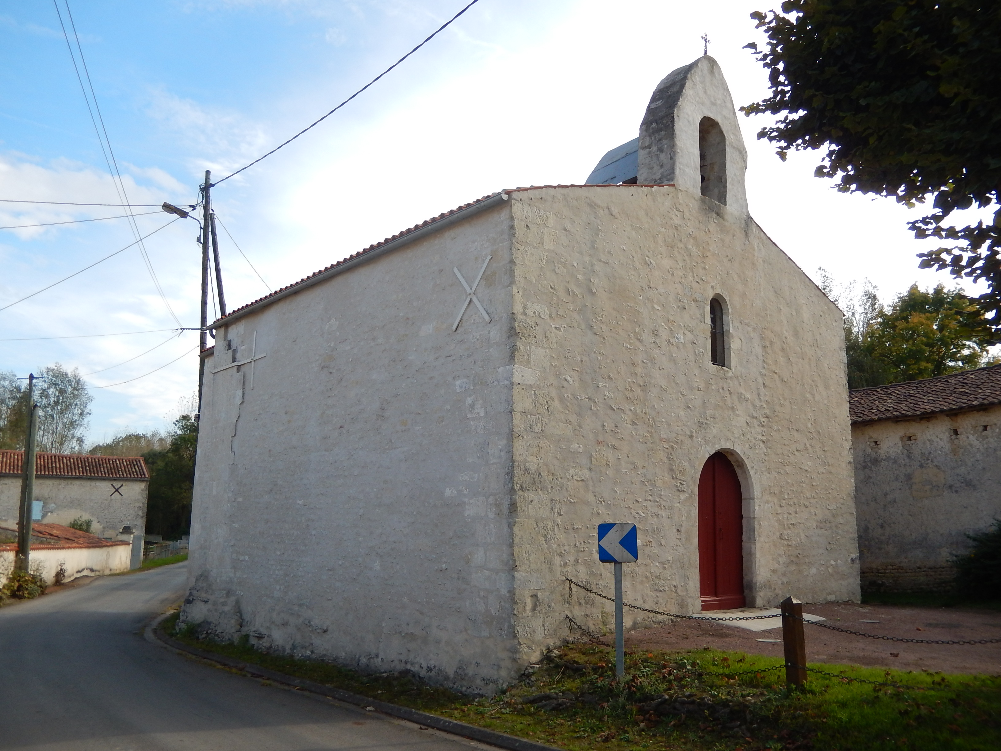 L'église de Saint-Pardoult, en Charente-Maritime.